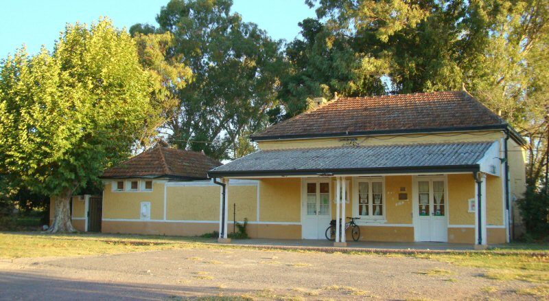 Estación Joaquín Gorina del FCGB, ex FCPBA